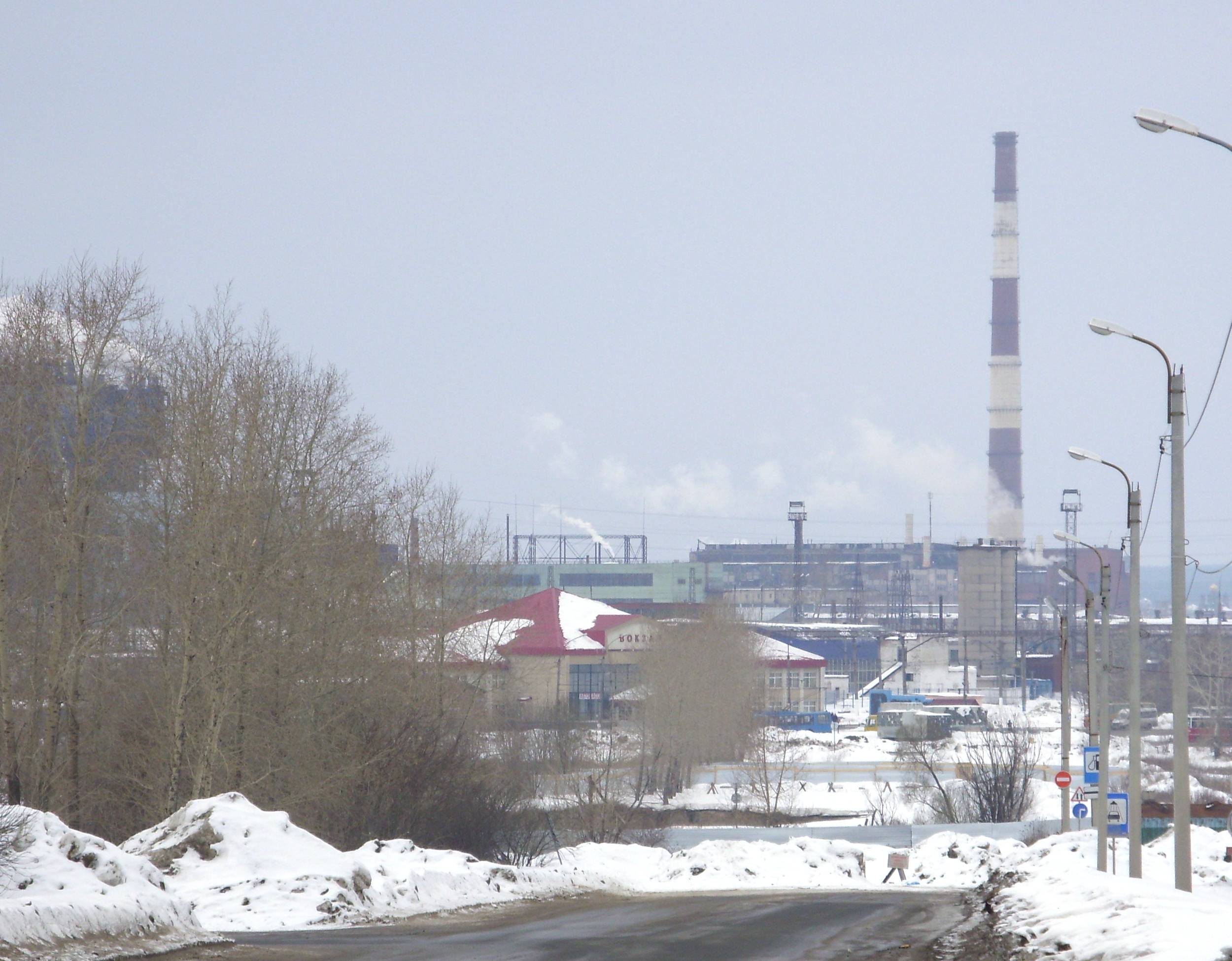 Вид с возвышенности (перекрестка улиц Тельмана и Калинина). Березники, Пермский край.